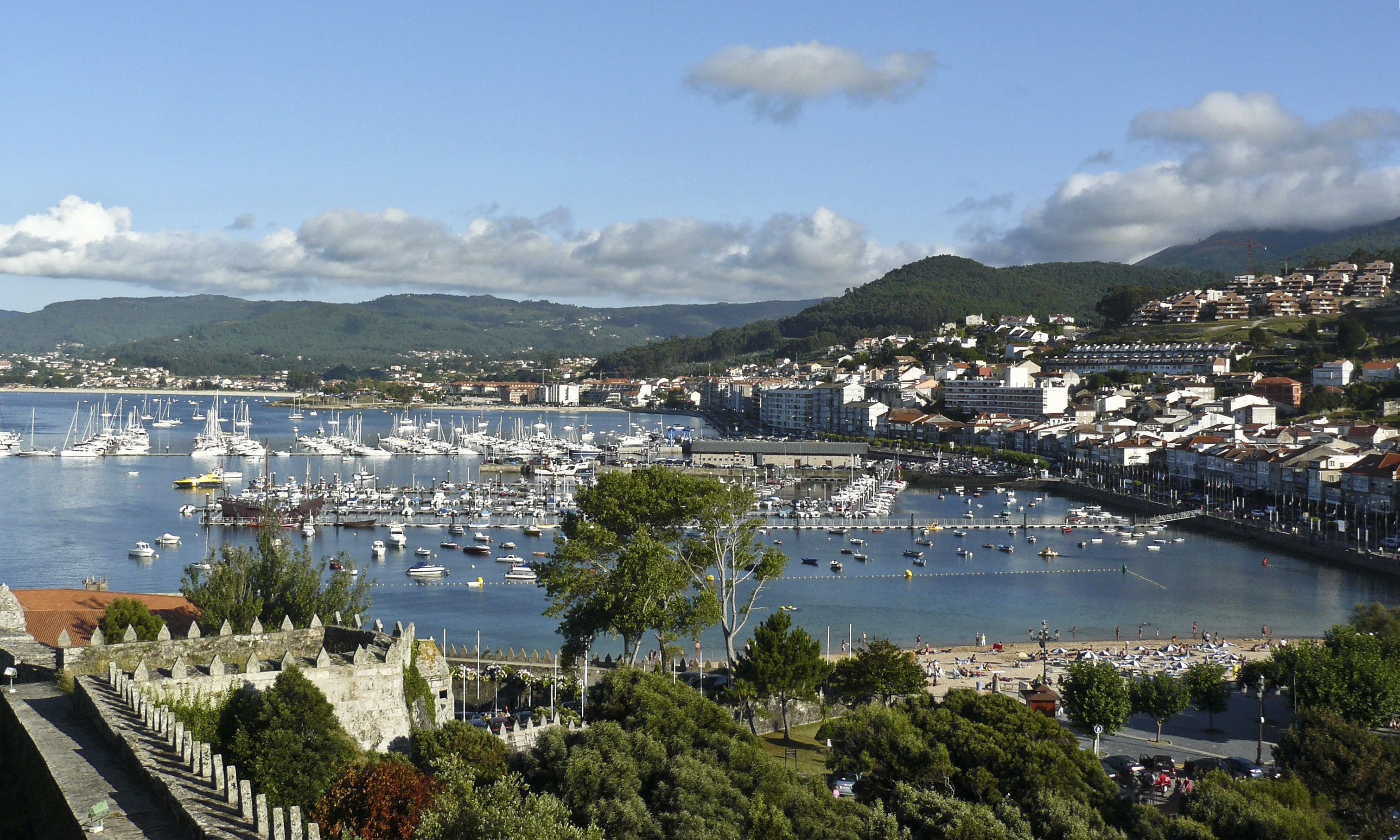 Vista do porto de Baiona desde Monterreal, Baiona, Galiza